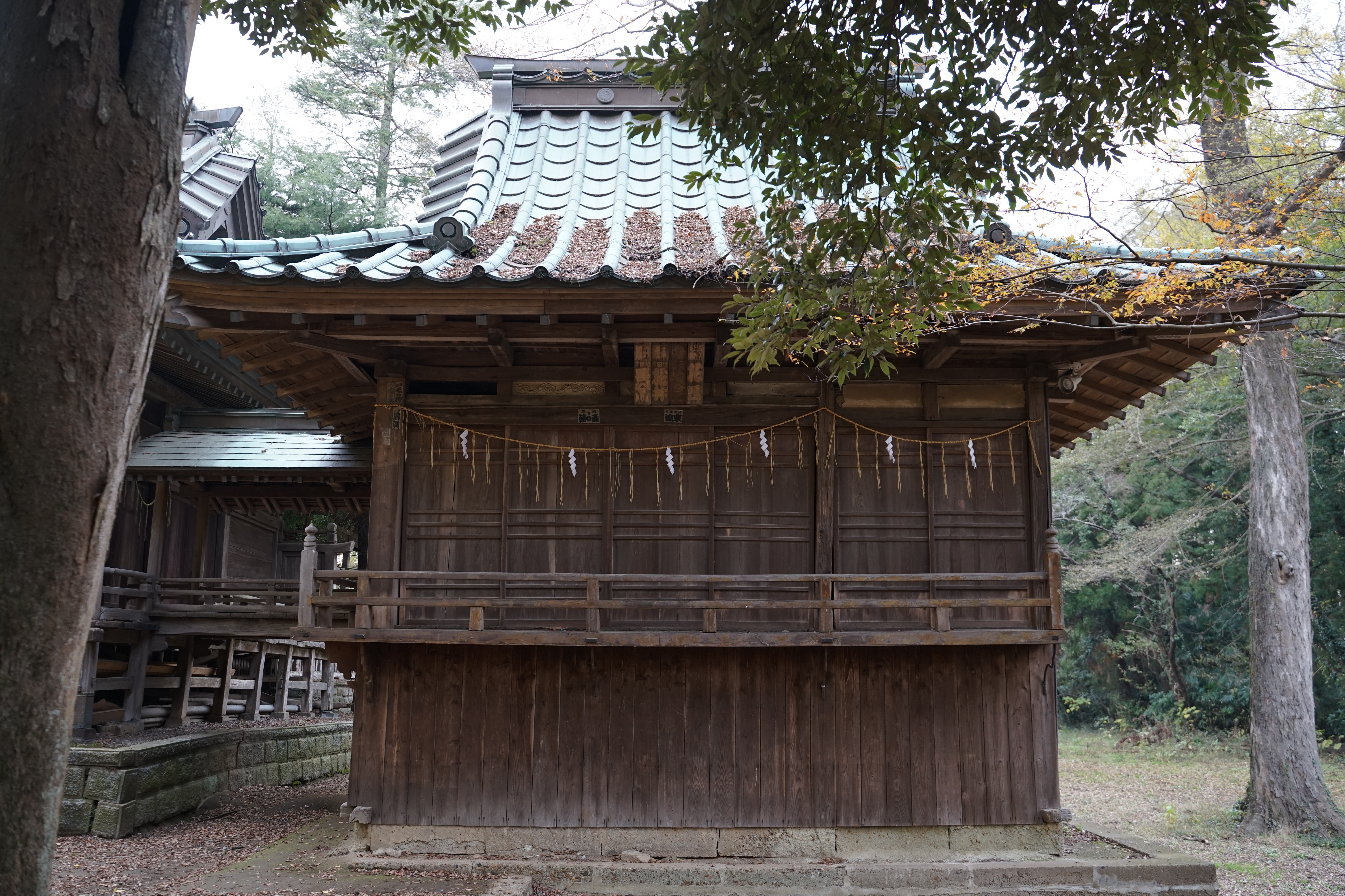 金村別雷神社の神楽殿（茨城県つくば市）